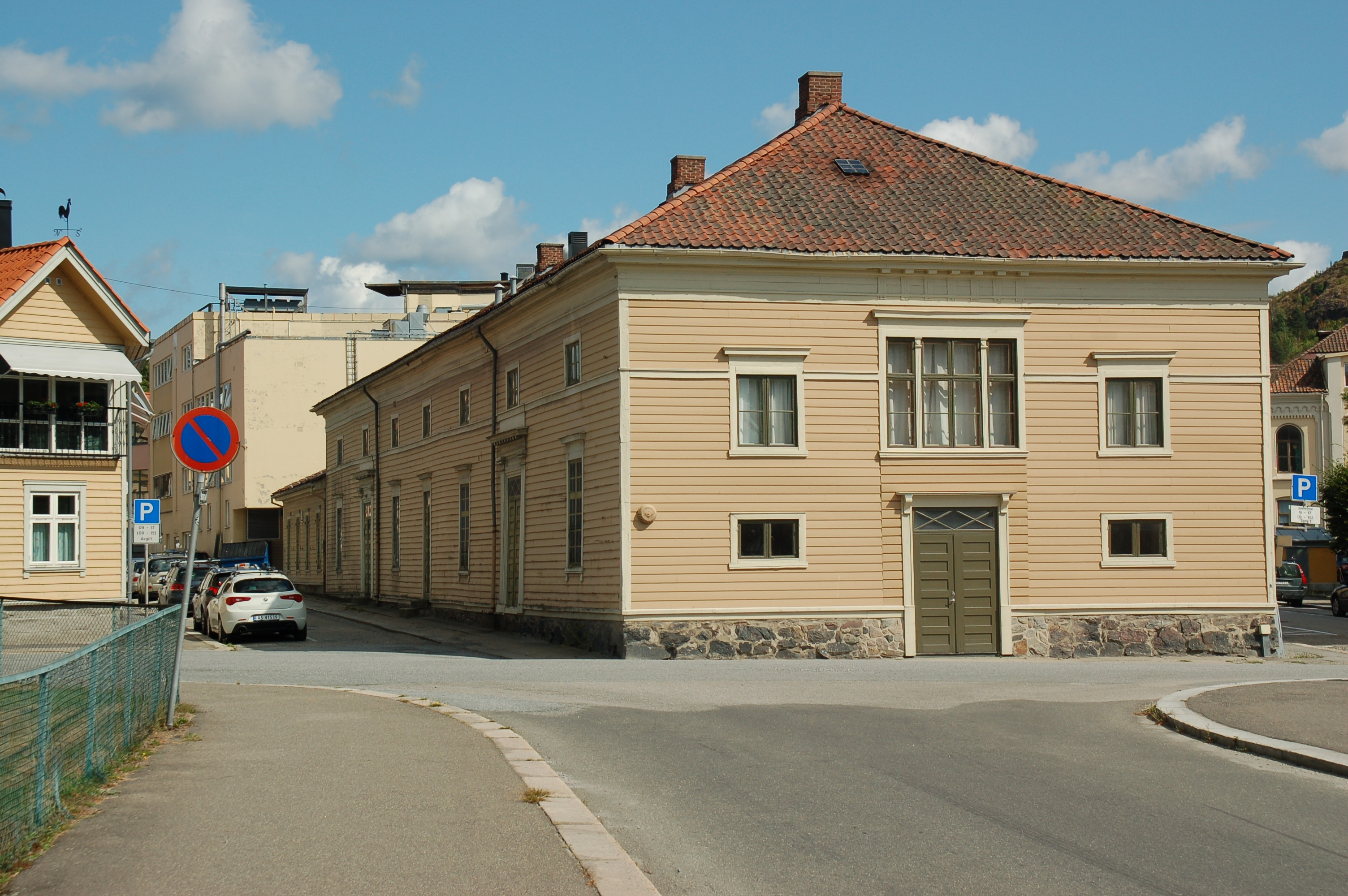 Fredrikshalds teater, Halden, oppført 1838, arkitekt Balthazar Nicolai Garben